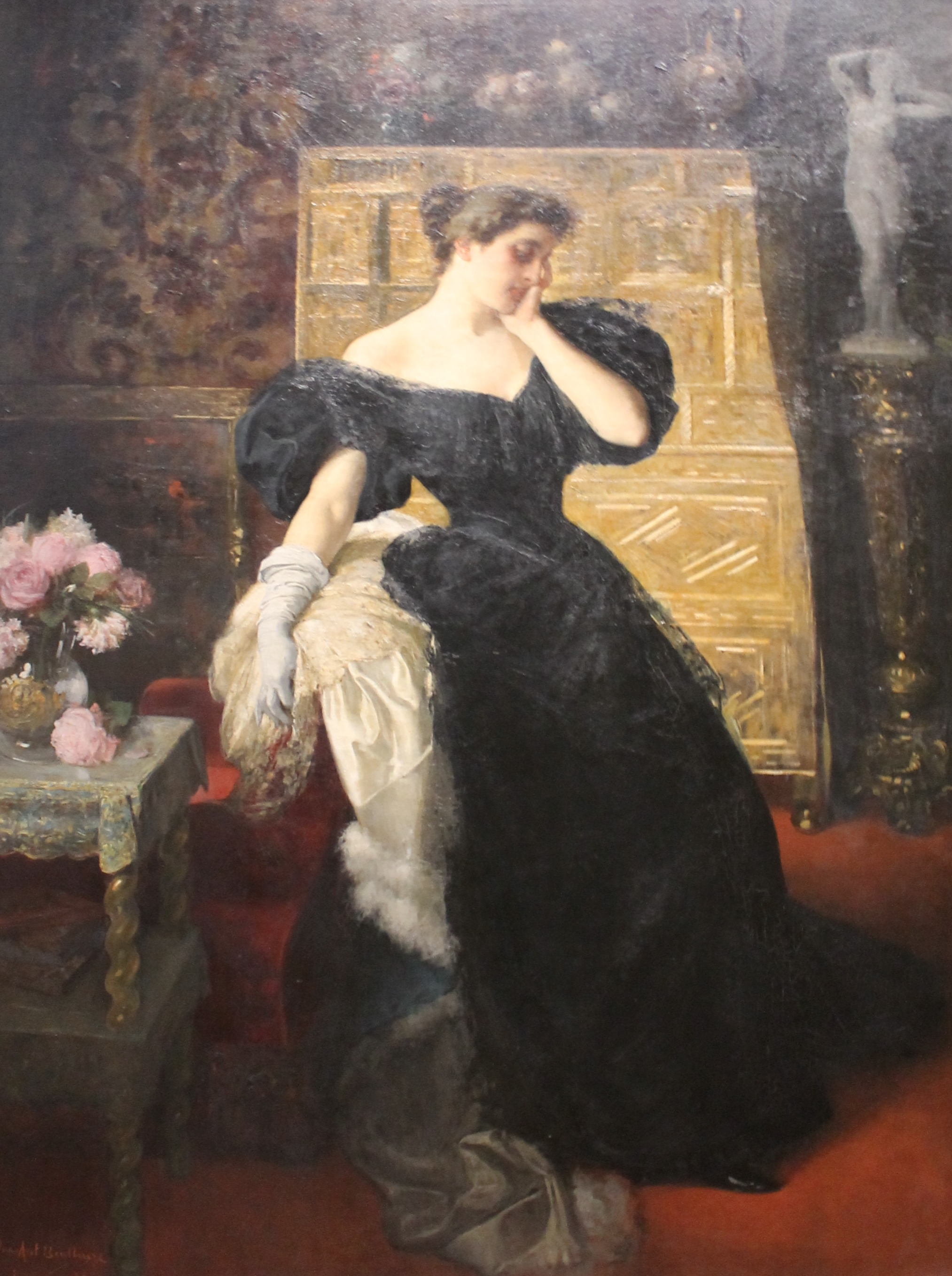 La vuelta del baile, óleo firmado en Roma por Juan Antonio Benlliure Gil en 1895. Museo de Málaga